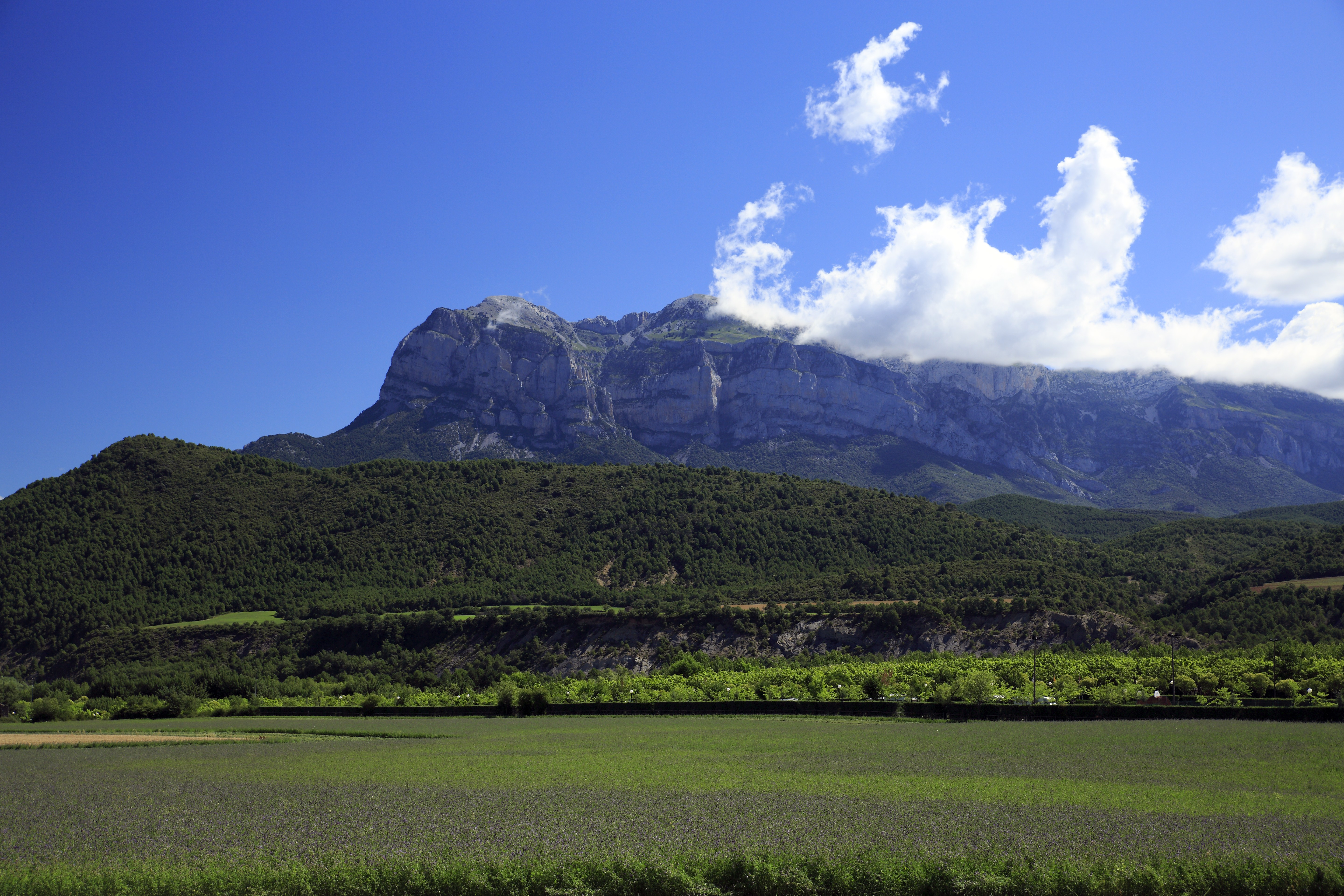 Die Peña Montañesa liegt etwa fünf Kilometer östlich von Escalona und ist der westlichste und höchste Gipfel einer ziemlich eigenständigen und etwa 15 Kilometer langen Bergkette, die von diesem Gipfel Richtung Südosten verläuft. Sie ist immerhin 2294 Meter hoch